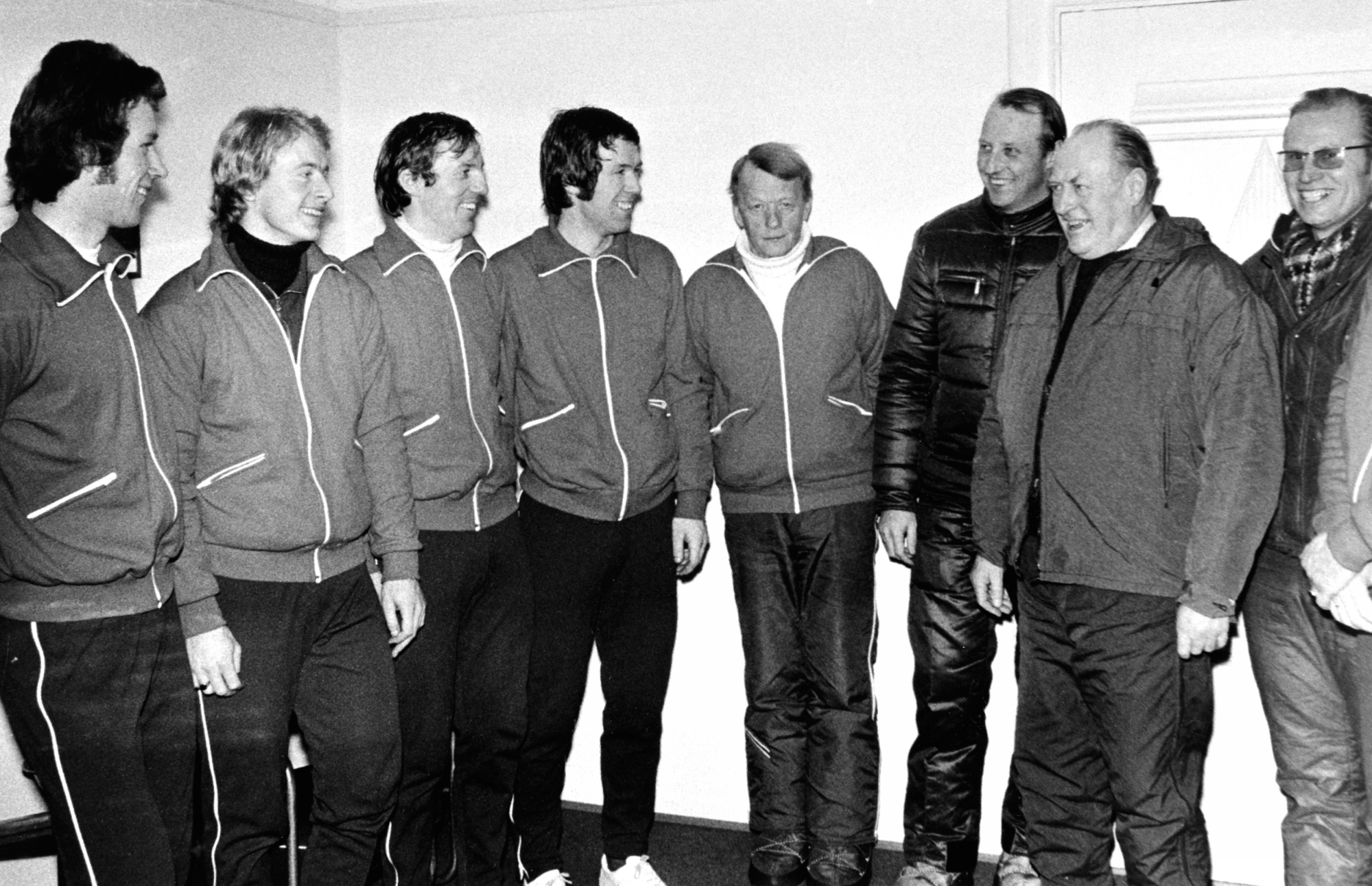 Fra venstre: Kay Arne Stenshjemmet, Amund Sjøbrend, Sten Stensen, Jan Egil Storholt, trener Johs Tenmann, kronprins Harald, kong Olav og ikke navngitt person med briller.